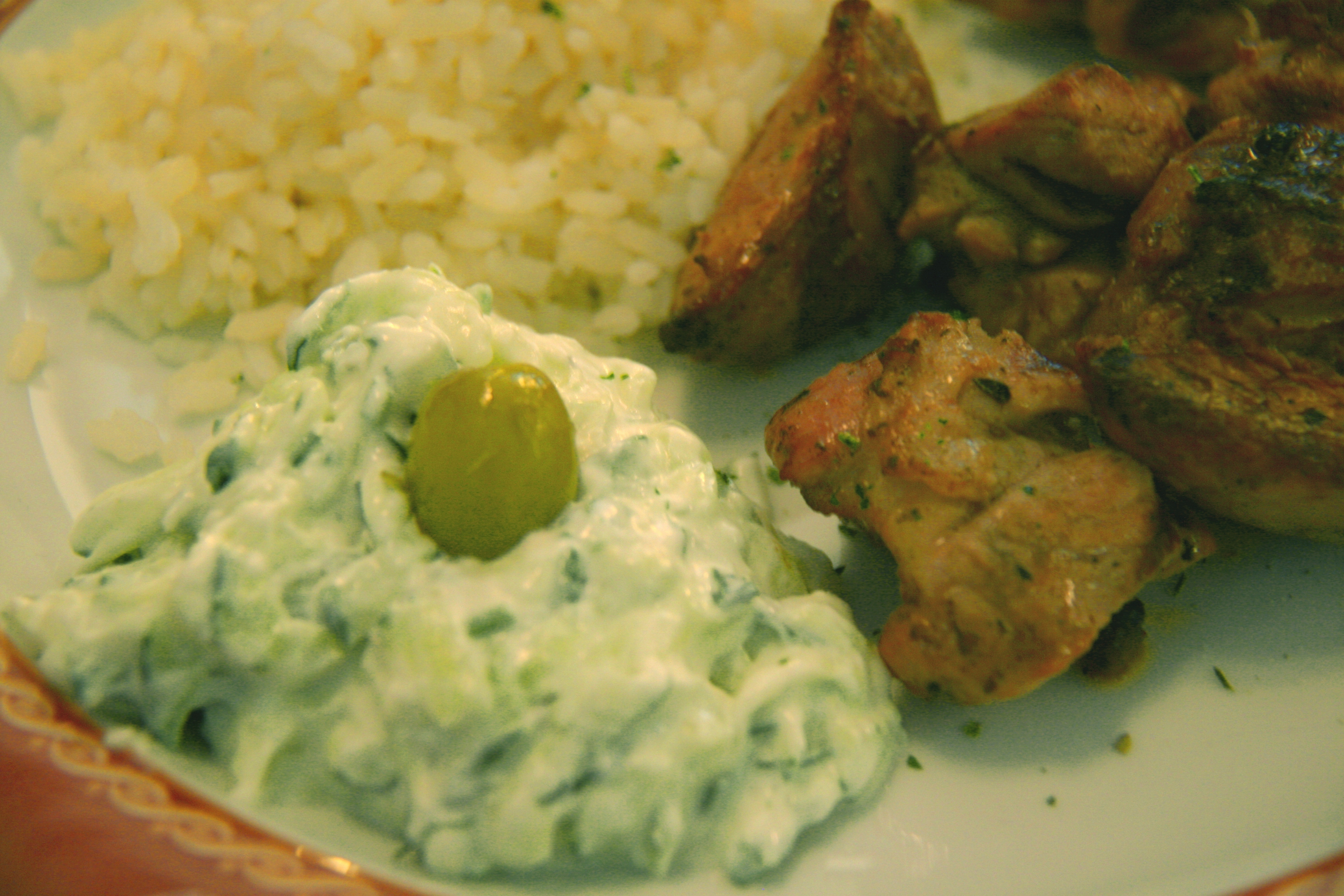 Tzatziki en un kebab de cordero con arroz